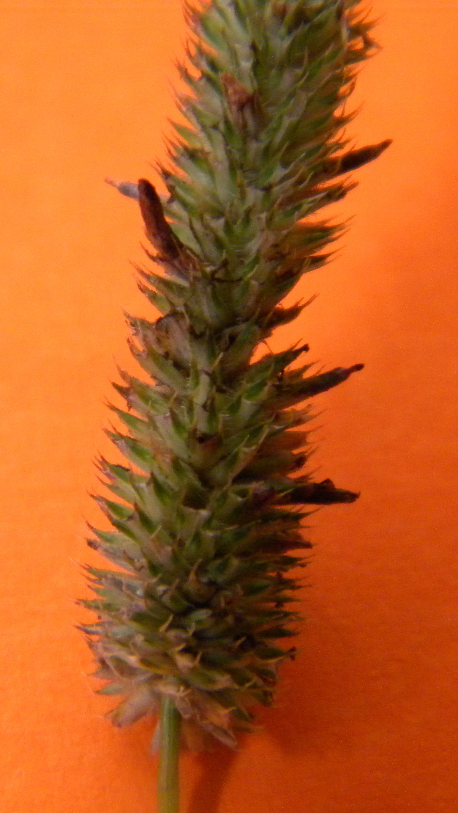 Phleum pratense kun Claviceps purpurea